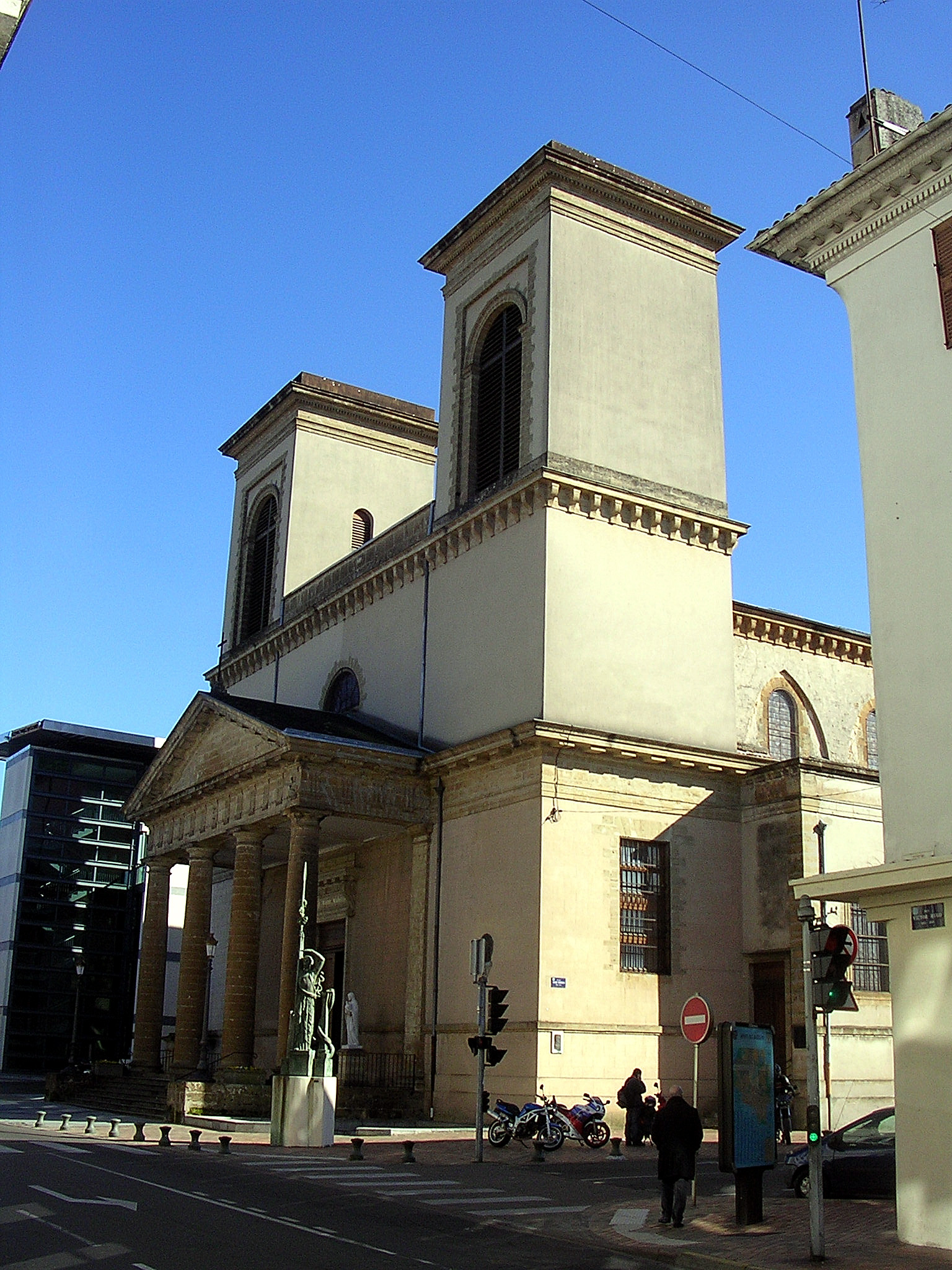 Façade de l'église de la Madeleine, à Mont-de-Marsan (Landes, France)